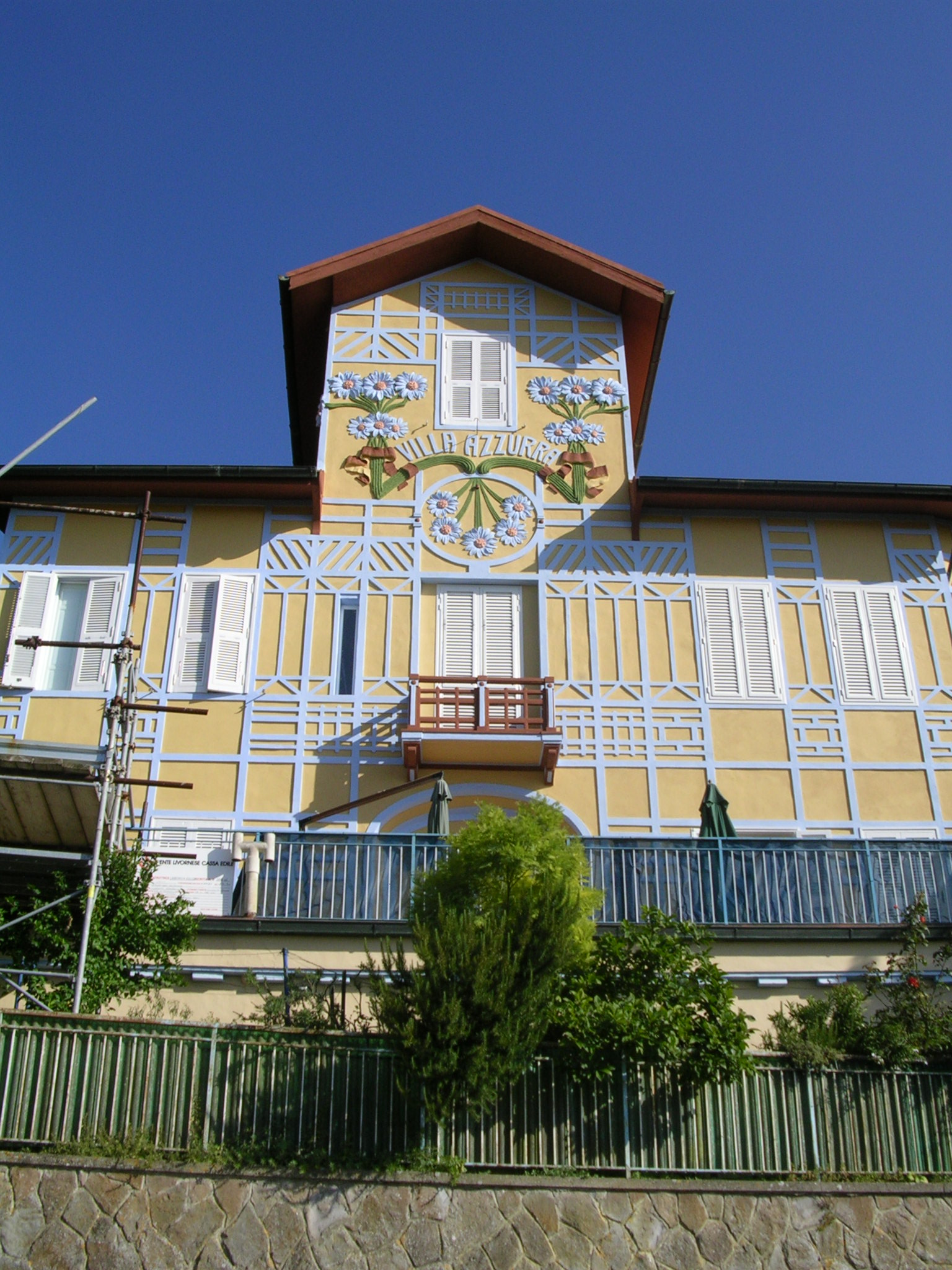 Livorno: la Villa Azzurra, realizzata all'inizio del XX secolo sul colle di Montenero.